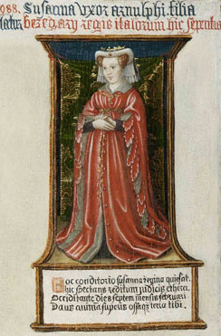 Porträt der Rozala-Susanna von Italien, Ausschnitt aus einer Tafel mit den Porträts der in der Genter Sankt-Peter-Kirche begrabenen Grafen von Flandern und deren Familienmitgliedern